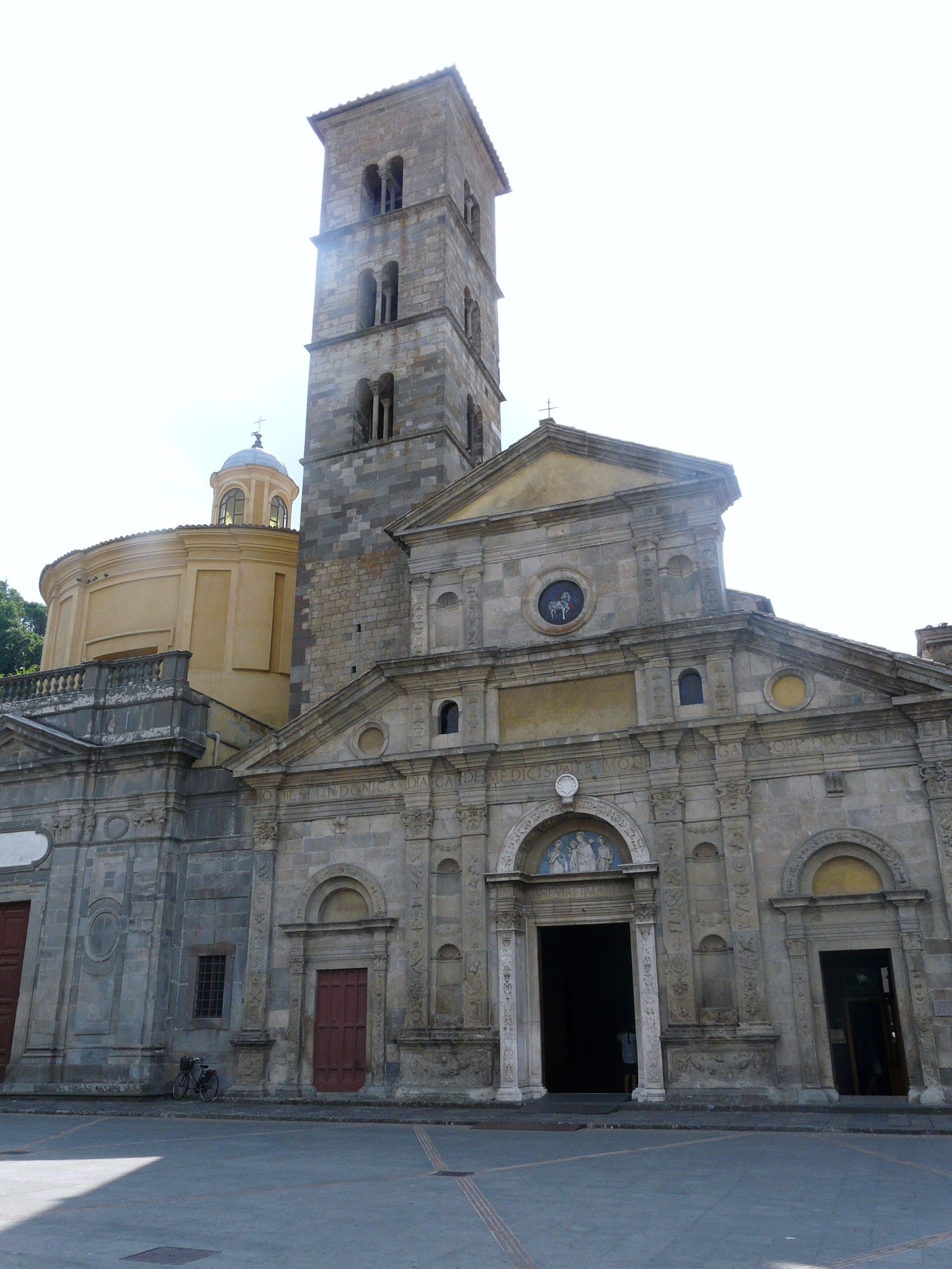 Basilica di Santa Cristina, Bolsena, Lazio, Italia